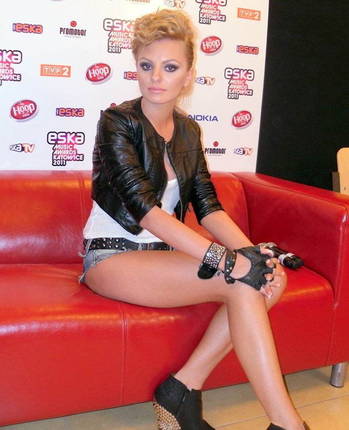 Alexandra Stan Zdjęcie zrobione podczas Eska Music Awards 2011 w katowickim Spodku.